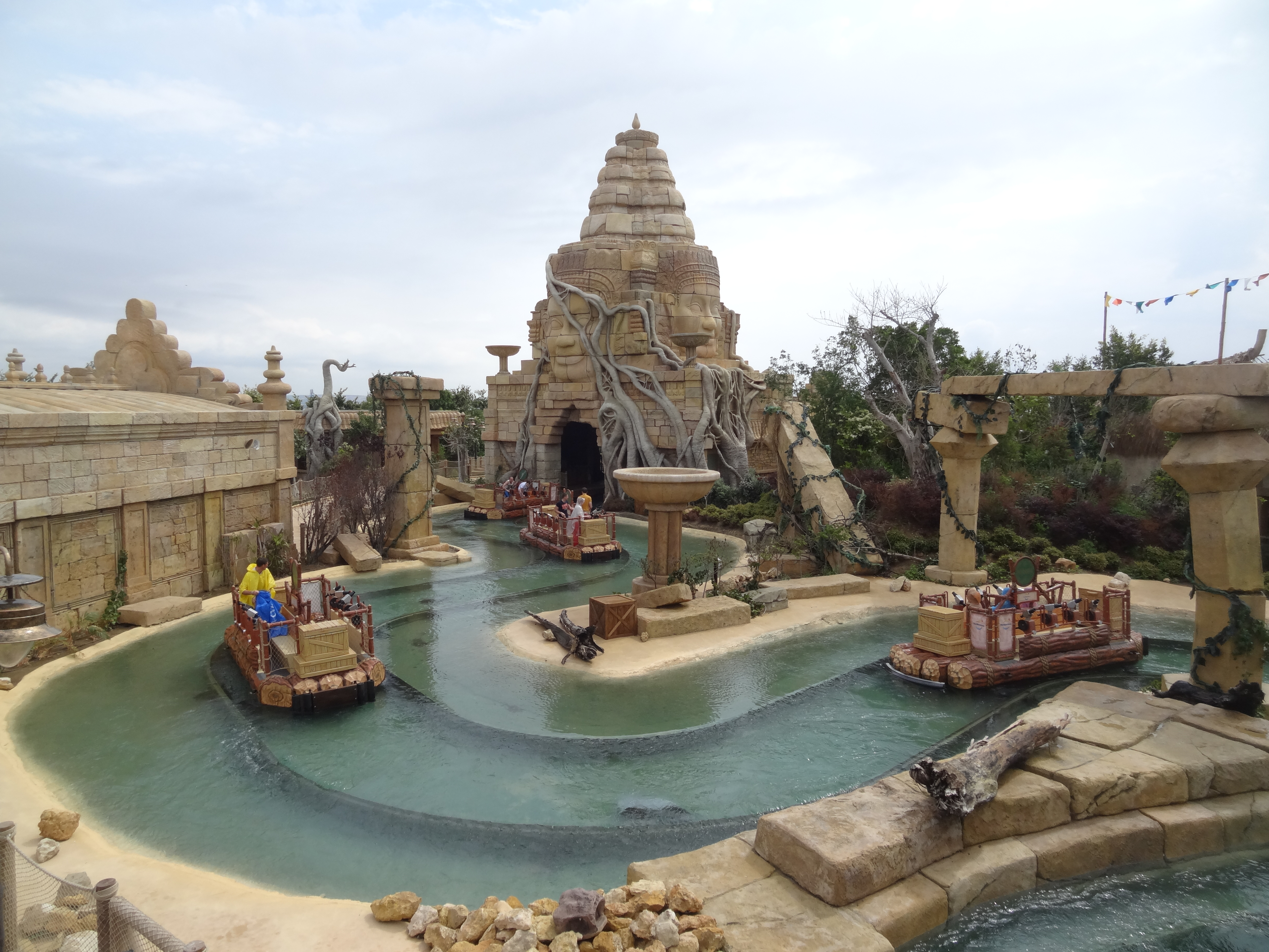 Angkor à Port Aventura